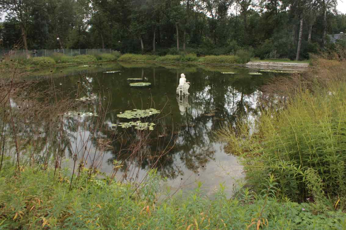 Garten Tulln je výstava zahradnické architektury